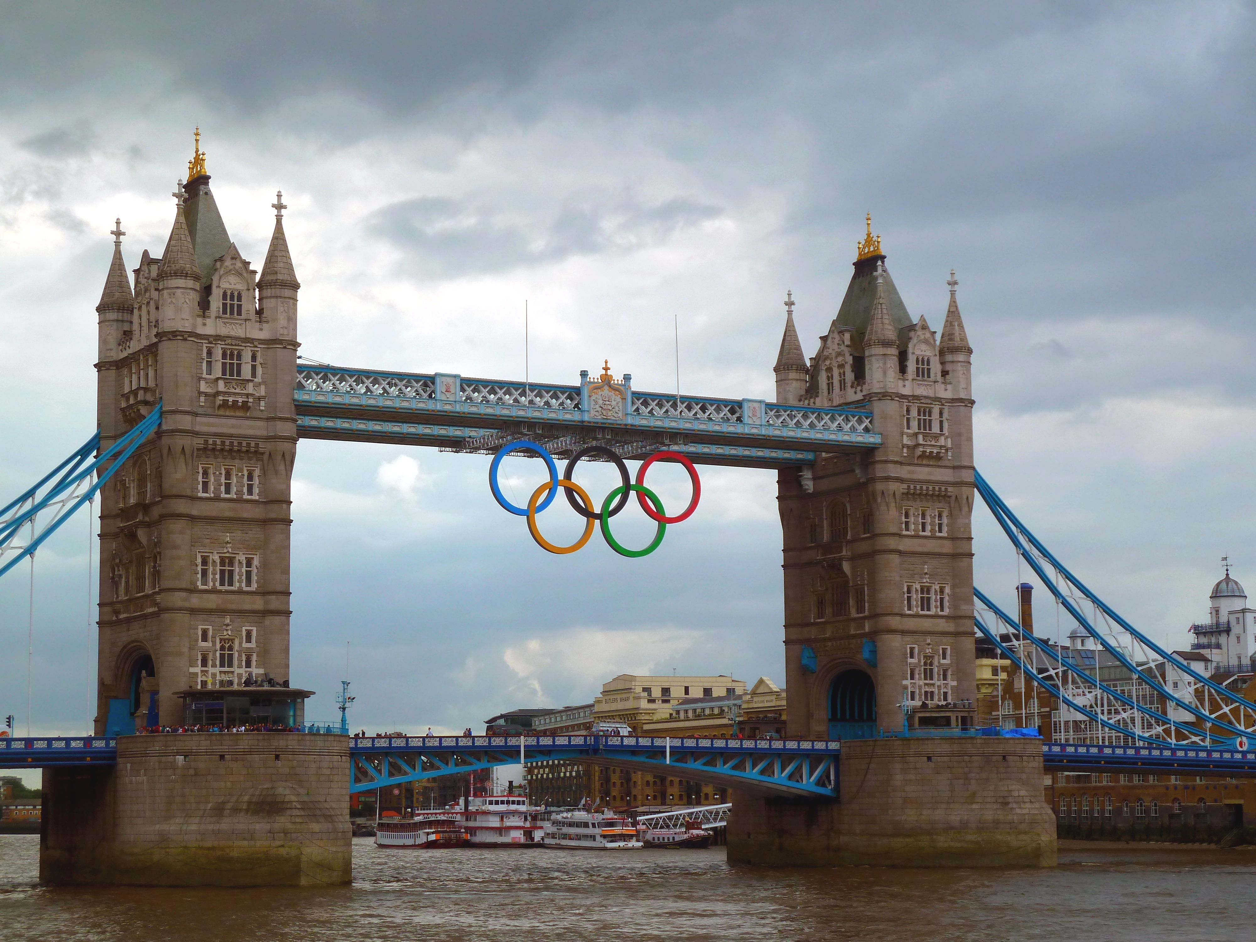 Die Tower Bridge im Sommer 2012, geschmückt mit den Olympischen Ringen, anlässlich der Olympischen Sommerspiele 2012 in London.